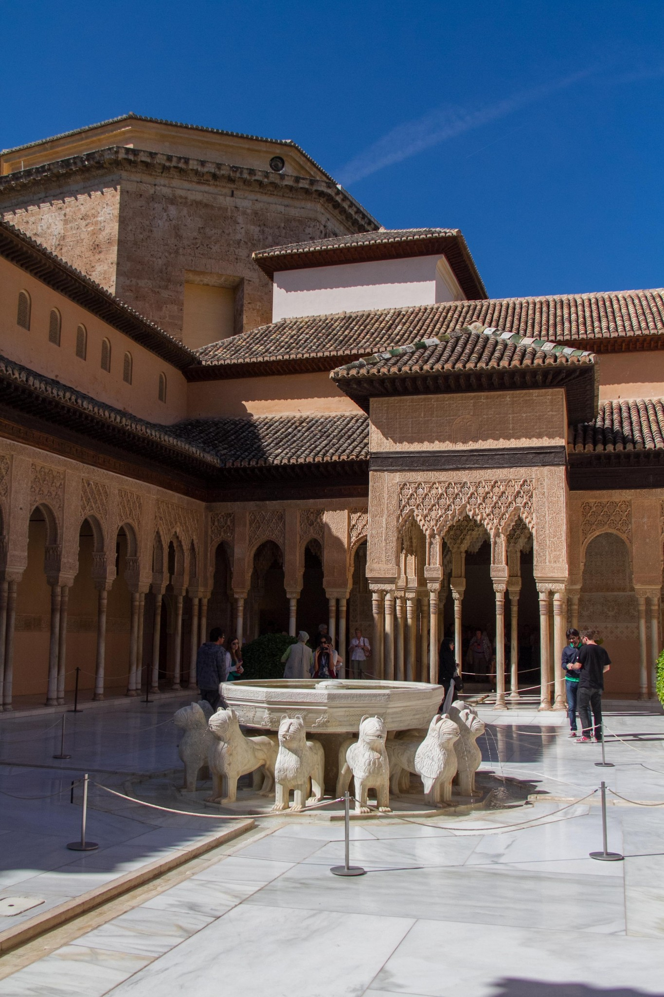 Alhambra